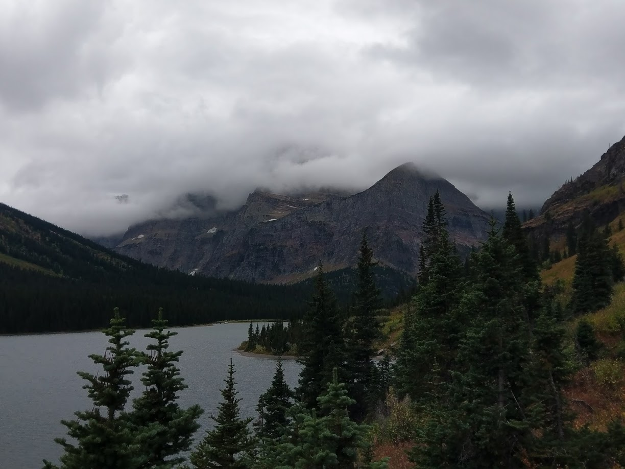 מצוקי גרניט בדרך לקרחון גרינל